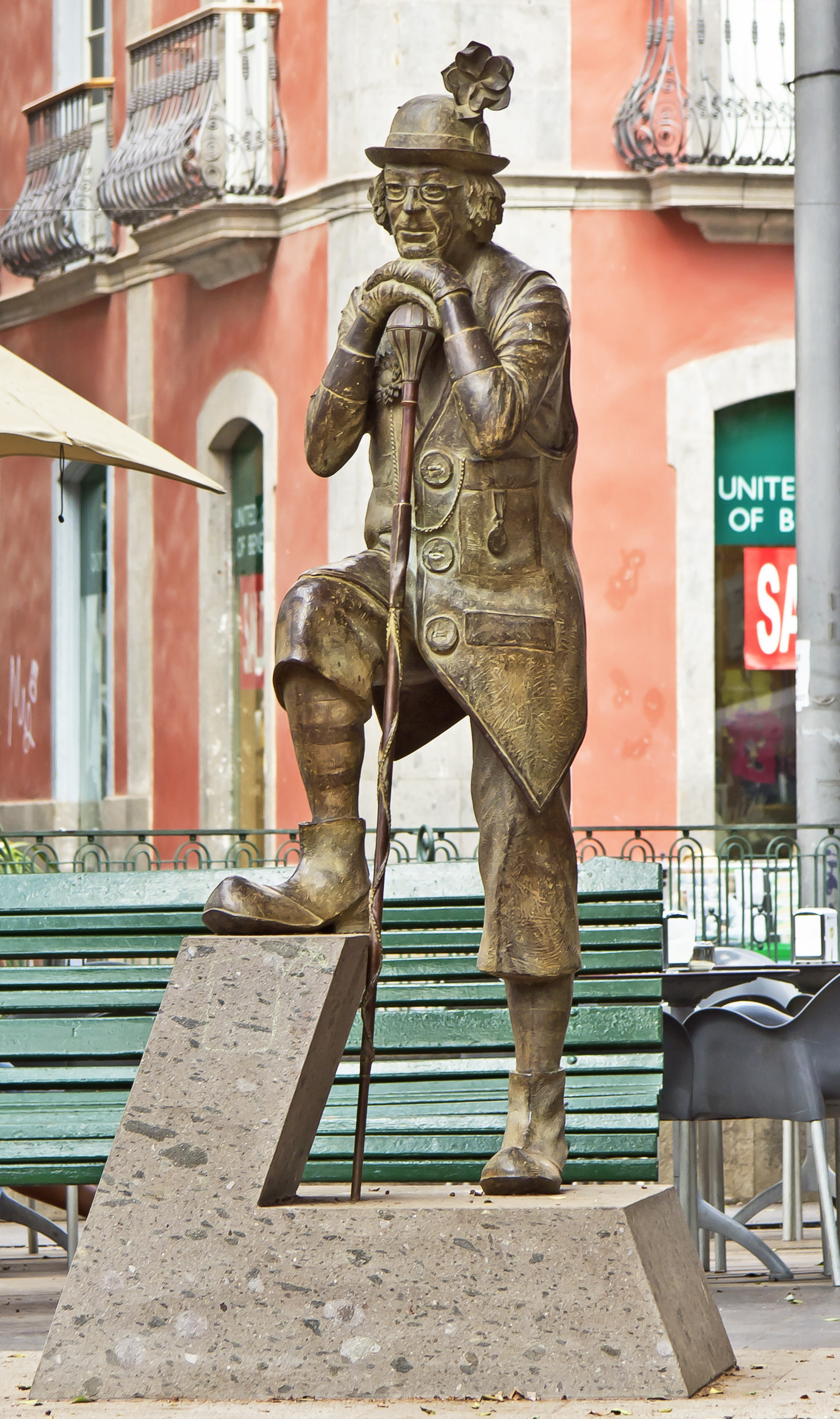 Das Denkmal zu Ehren von Don Enrique González Bethencourt dem Gründer und Leiter der Karnevalskapelle „Murga Ni fu ni fa“ befindet sich seit dem 13. Mai 2013 auf der Plaza del Príncipe in Santa Cruz de Tenerife. Es wurde von der Werkstatt „Bronzo“ in La Laguna geschaffen.